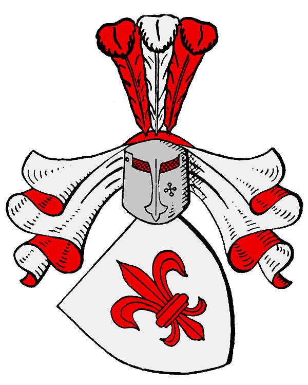 Stammwappen derer von Kamptz